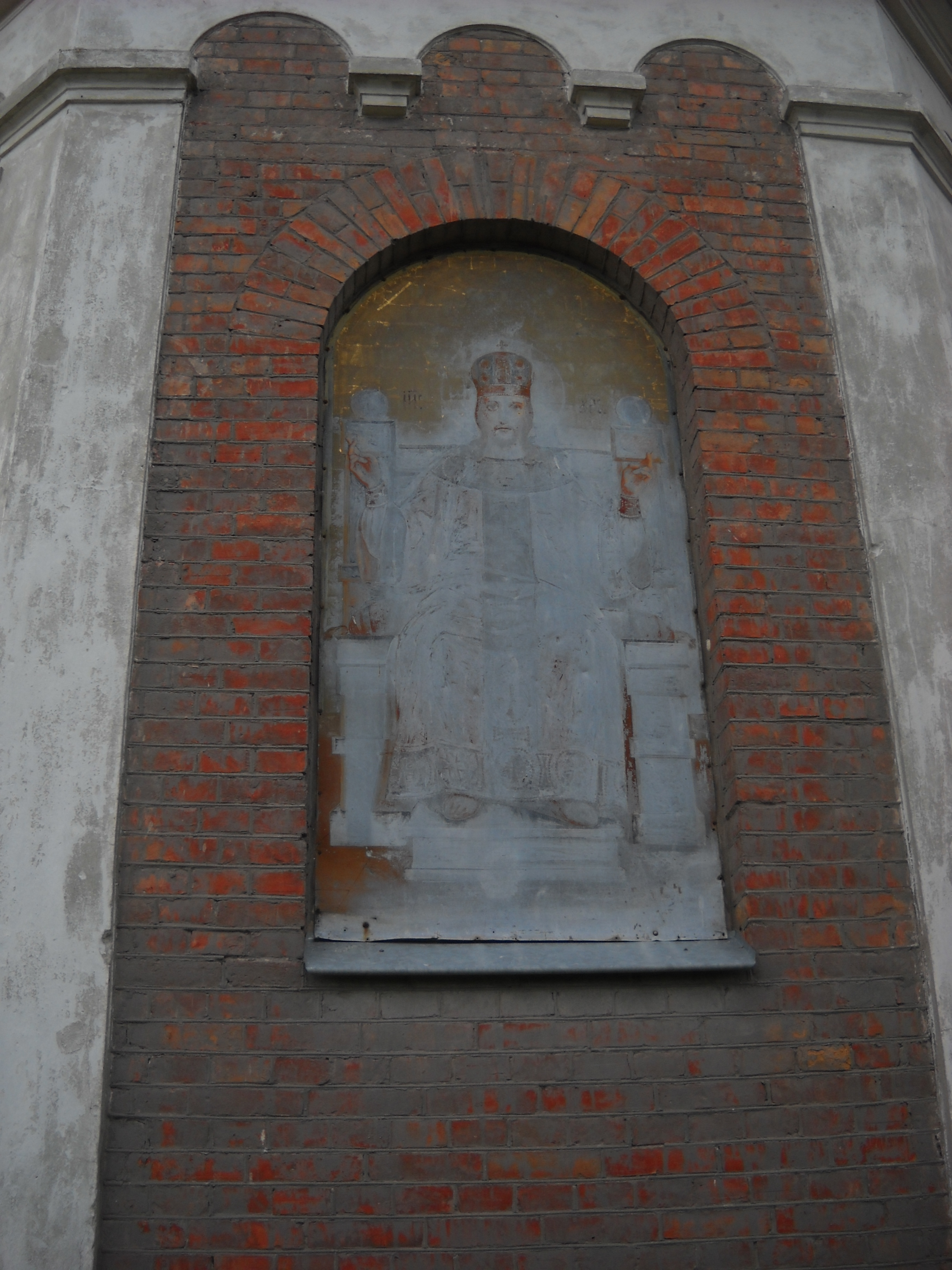 Cerkiew prawosławna w Sławatyczach